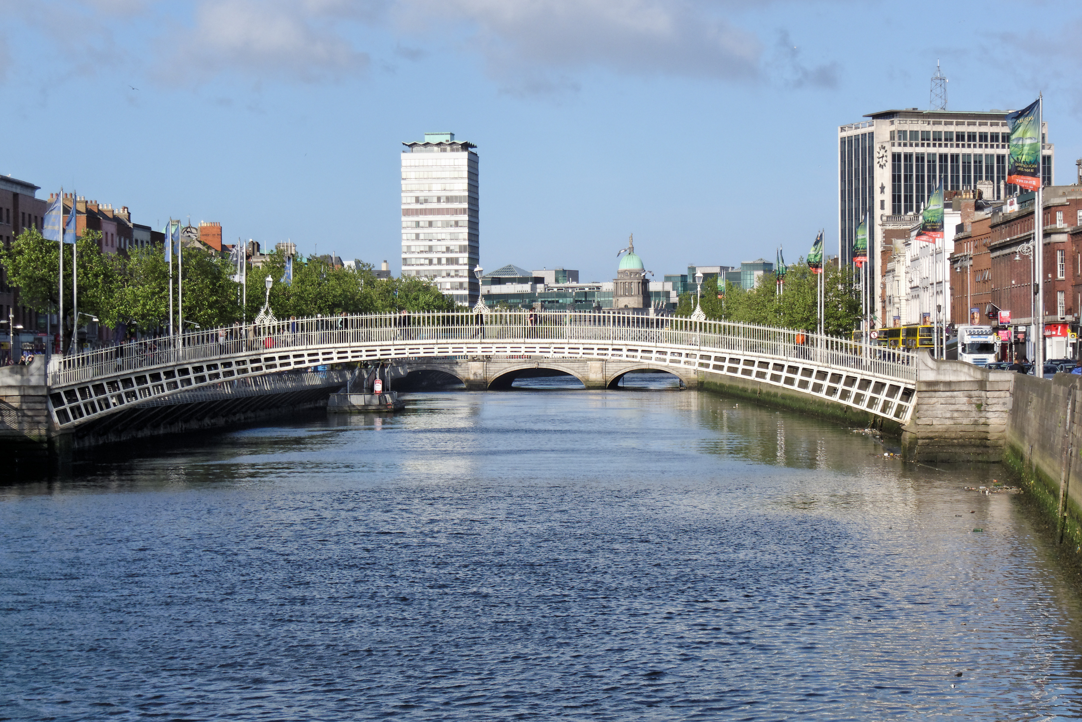 Puente Ha'penny. Dublín, Irlanda.